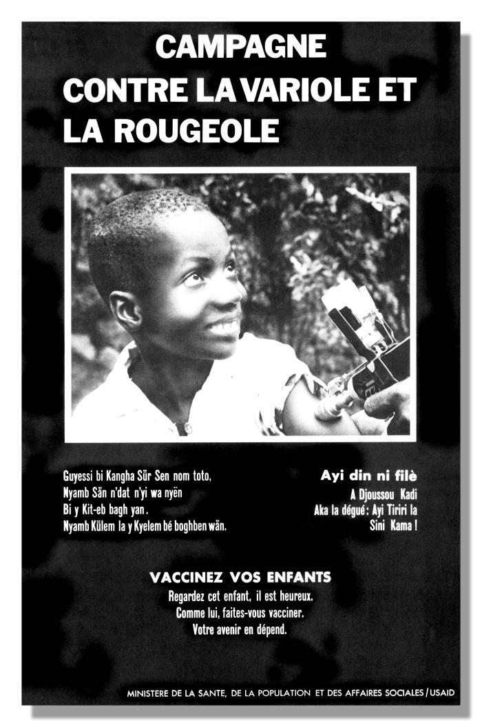 Affiche de promotion de la vaccination contre la variole et la rougeole (1979) - domaine public - origine (image id: 2585)